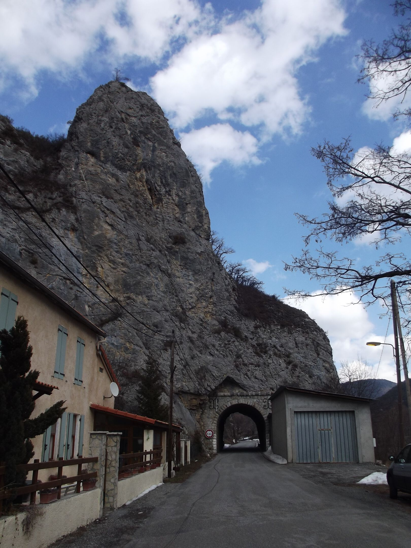 Tunnel à l'entrée (en aval) de Barles